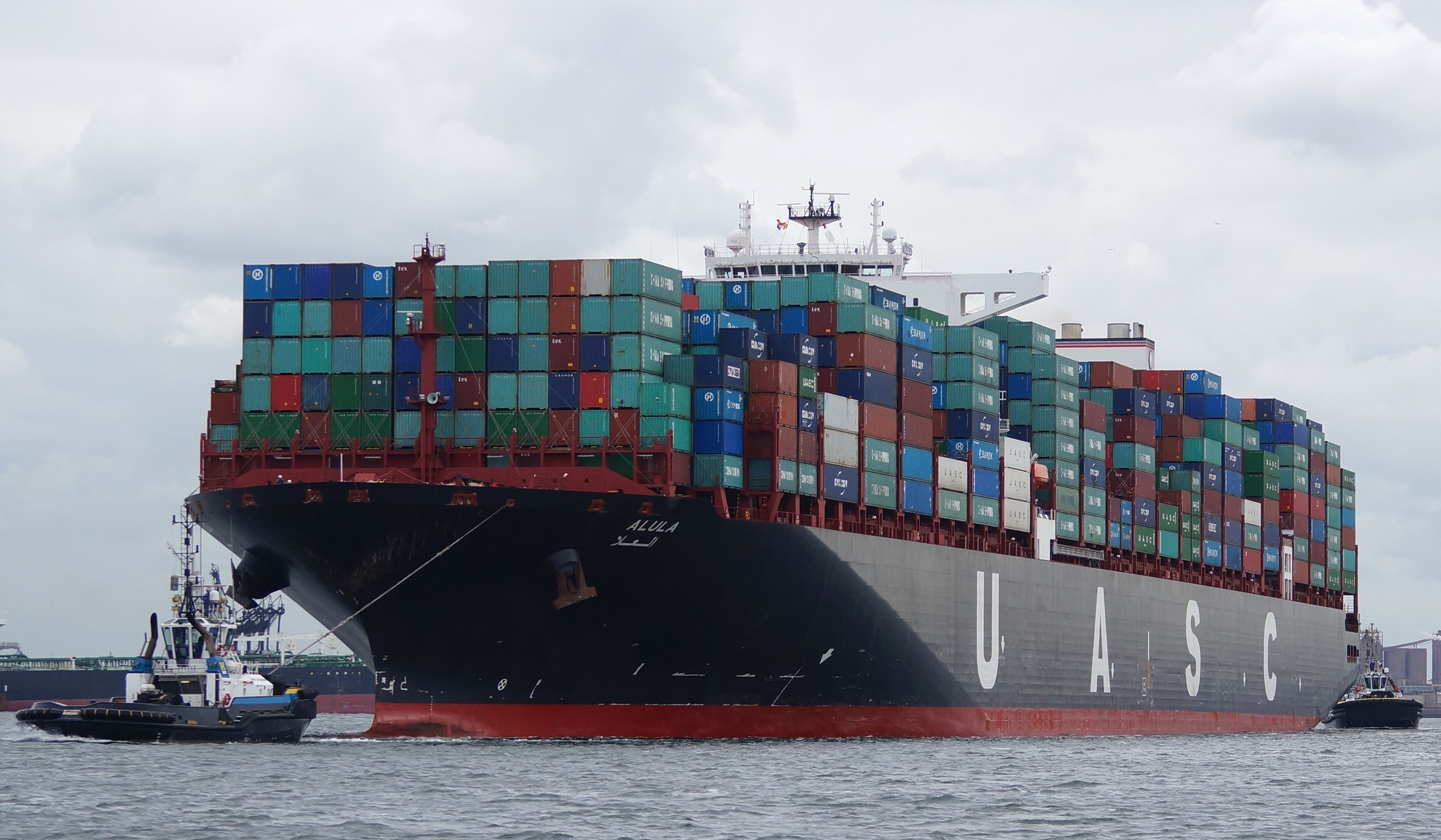 Yangtzehaven 8-5-2014